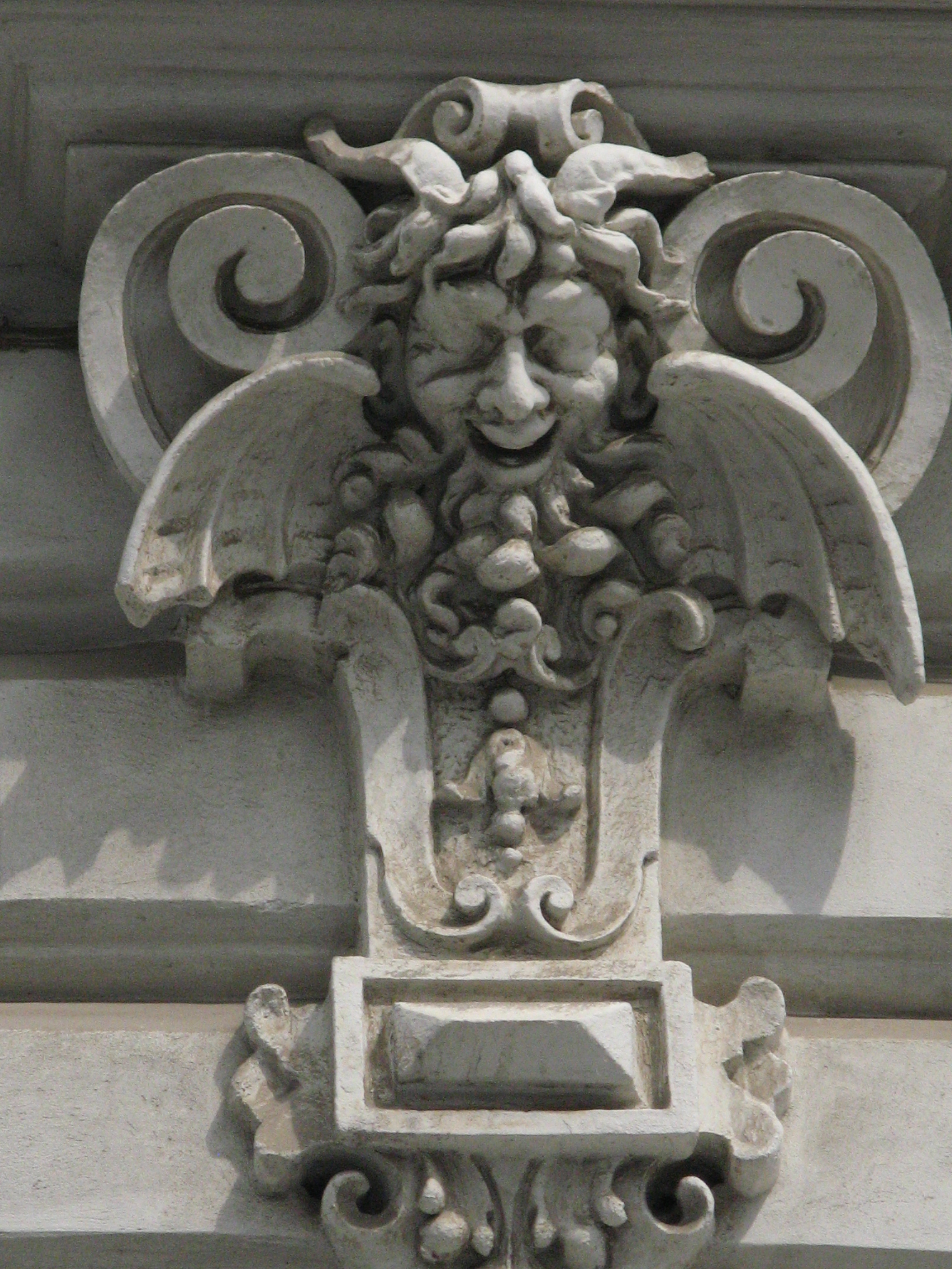 Bartensteingasse 8, Wien-Innere Stadt